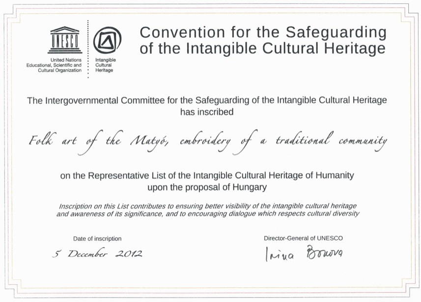 Oklevél